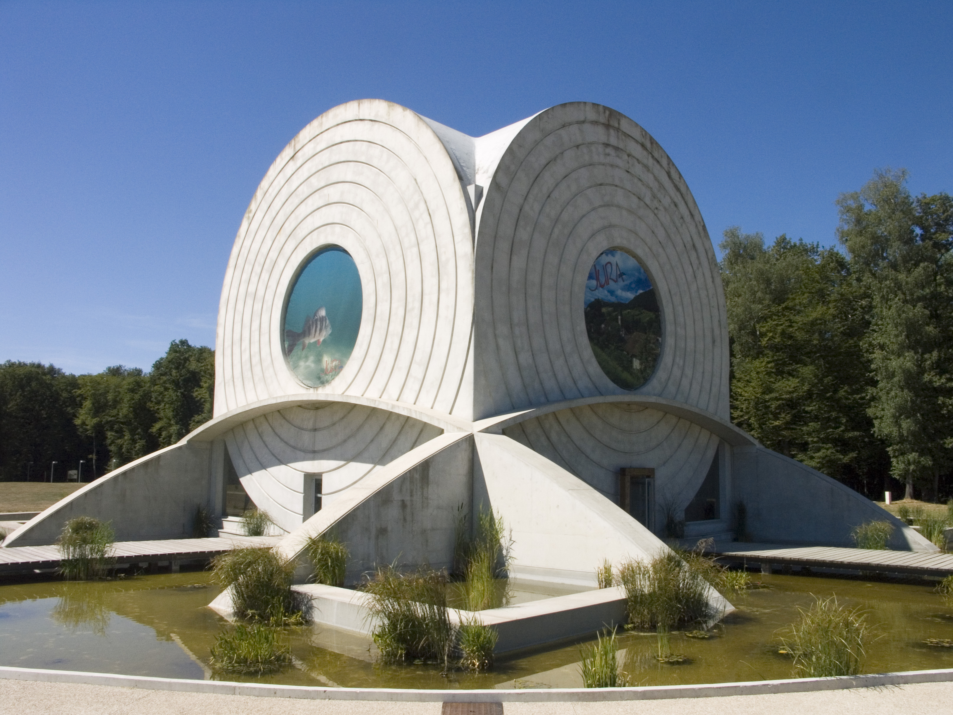 Bâtiment selon les plans de Claude Nicolas Ledoux (Aire d'autoroute du Jura). Cet "Atelier des Cercles" imaginé pour sa Cité Idéale, Chaux. Elle fait partie des divers bâtiments agricoles, sortes de collections parlantes des métiers de la vallée de la Loue.